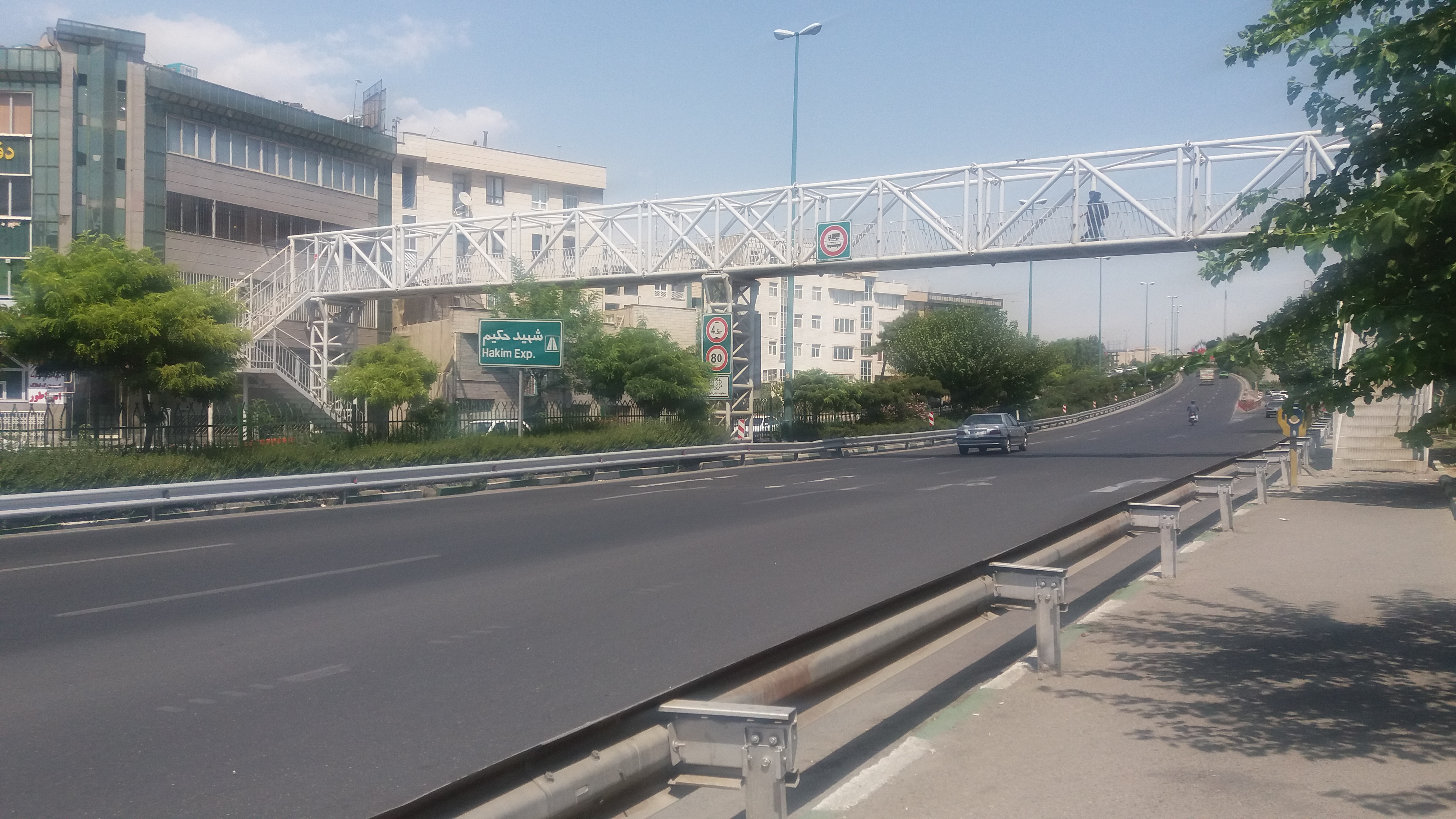 بزرگراه آیت‌الله حکیم - تهران - ۱۳۹۵